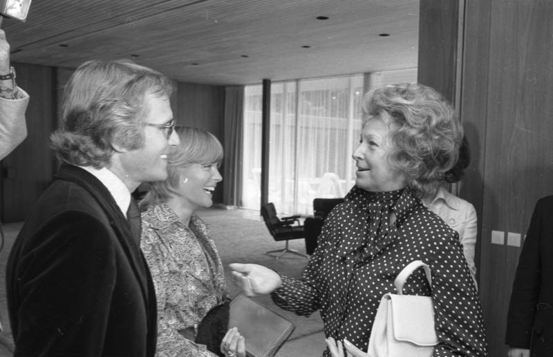 Bundeskanzler Willy Brandt empfängt Filmschauspieler